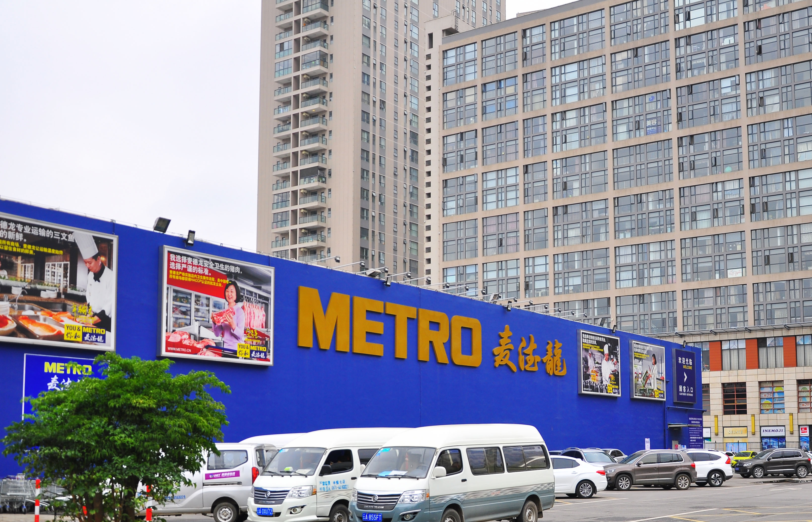 昆明麦德龙超市北市区店。